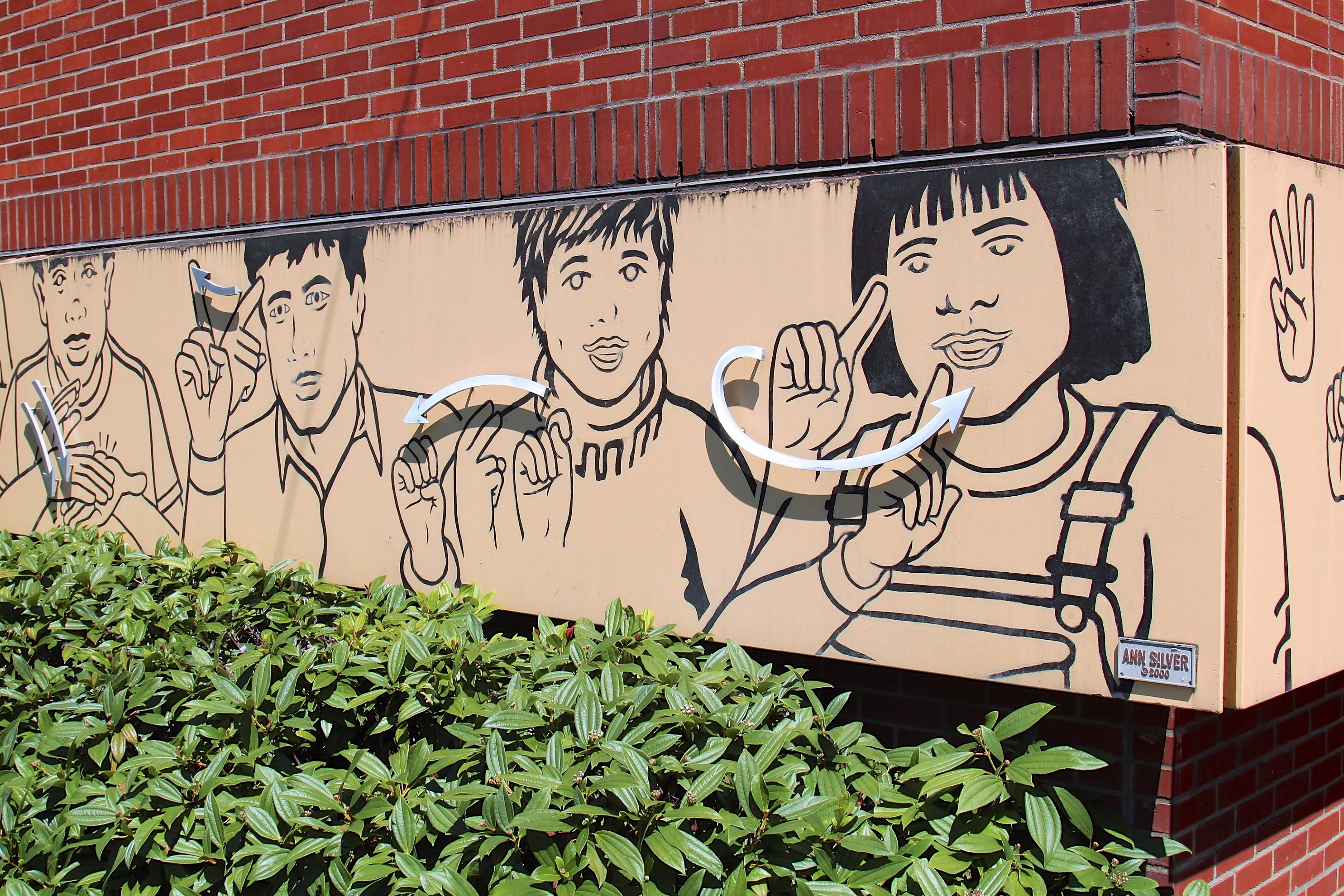 Darstellung von verschiedenen gebärdensprachlichen Handzeichen (Gebärden) der Amerikanischen Gebärdensprache (American Sign Language, ASL) auf einem Wandfries an der Gehörlosenschule Washington School for the Deaf in Vancouver (Washington) im US-Bundesstaat Washington.